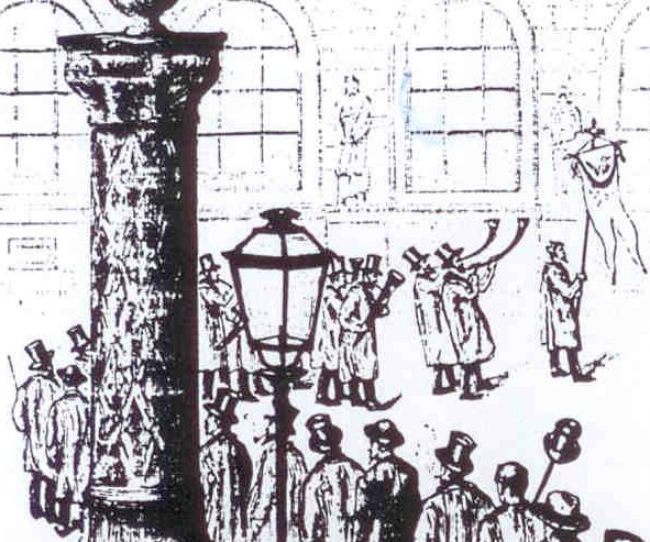 Détail d'un dessin figurant un monôme à l'École des Beaux-Arts de Paris en 1889